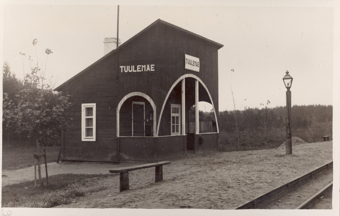 Tuulemäe raudteepeatus enne Teist maailmasõda